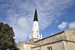 Le Clocher de l'église d'Ars-en-Ré. Photo de ma banque d'images personnelle